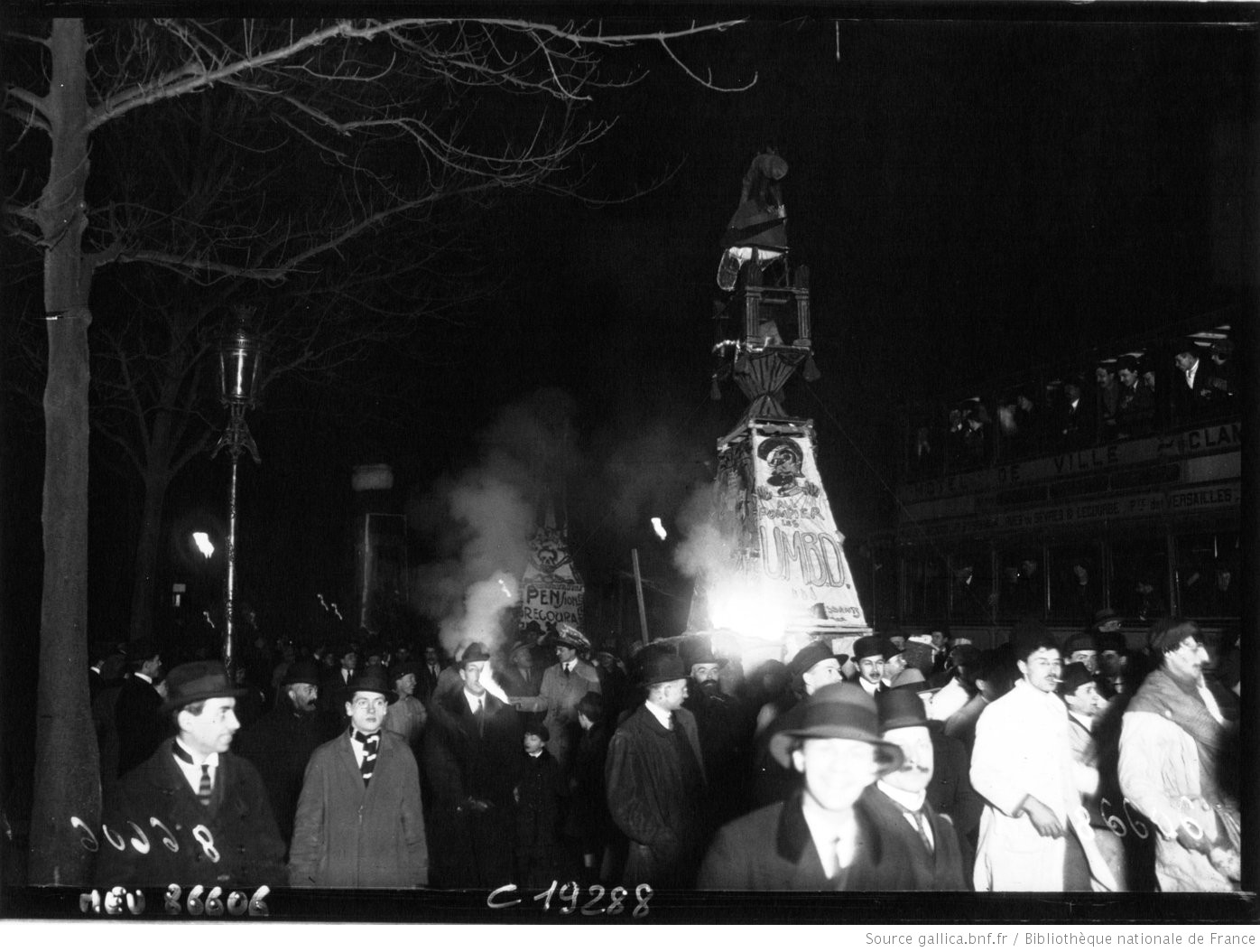 Balade du Rougevin - défilé de 1921